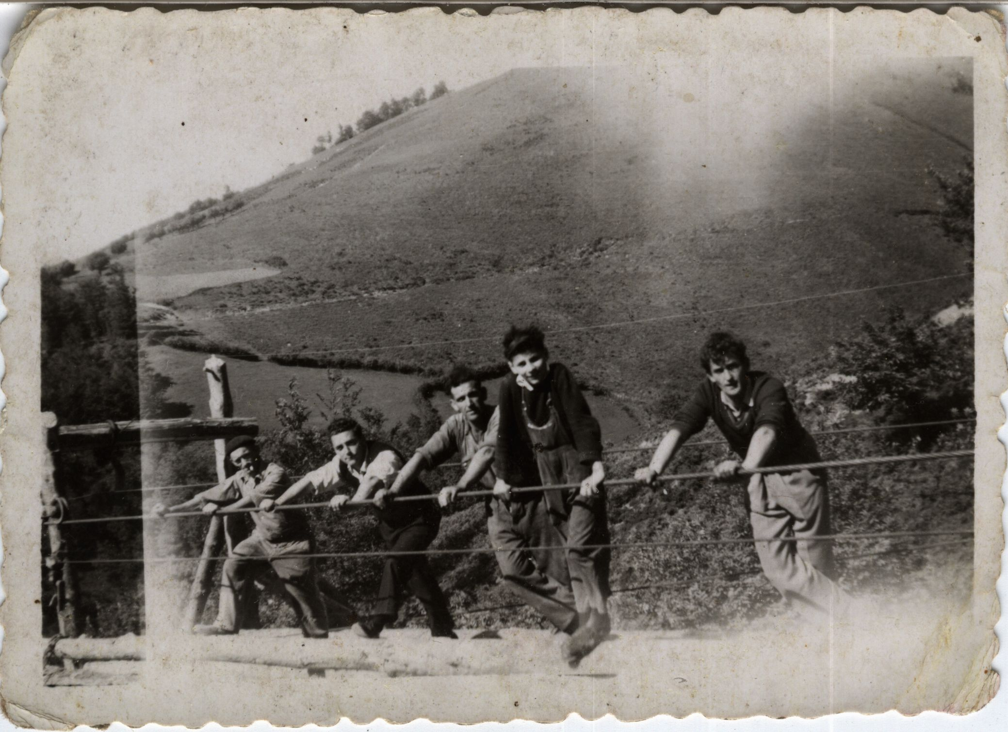 San Gregorio auzoko Artaditxulo baserriko Eskisabel anaiak eta langileak Gesalbe eremuko egur kargaderoan. Belarra eta egurra ustiatzeko airezko kableak Artaditxuloko Bixente Esquisabelek bultzaturiko irtenbidea izan zen.